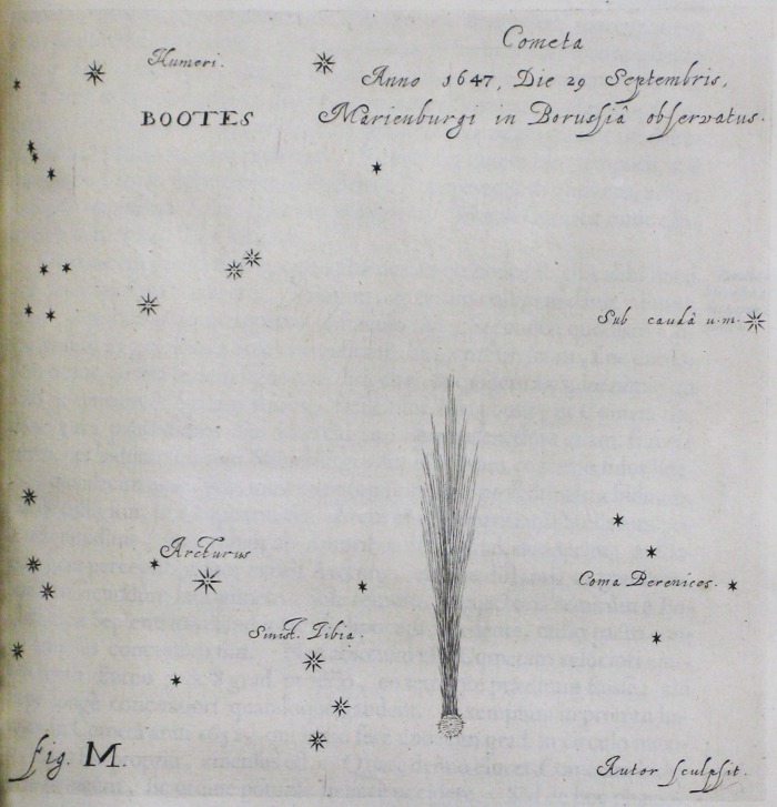 Tavola M dell'opera Cometographia di Johannes Hevelius